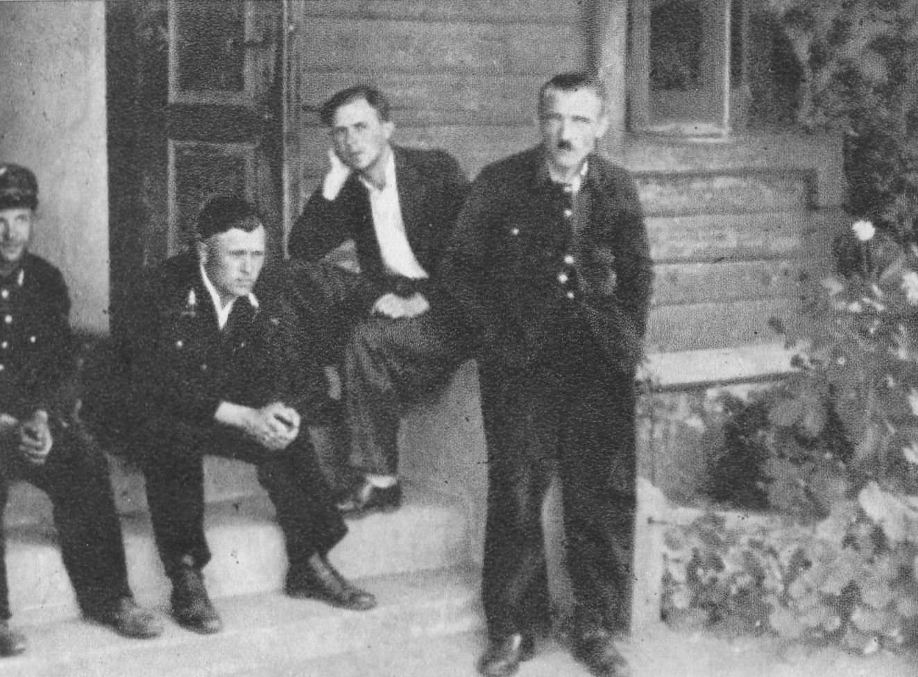 Od lewej: Stanisław Borowy, Józef Kuźmiński, Józef Pogorzelski i Franciszek Ząbecki na stacji kolejowej w Treblince